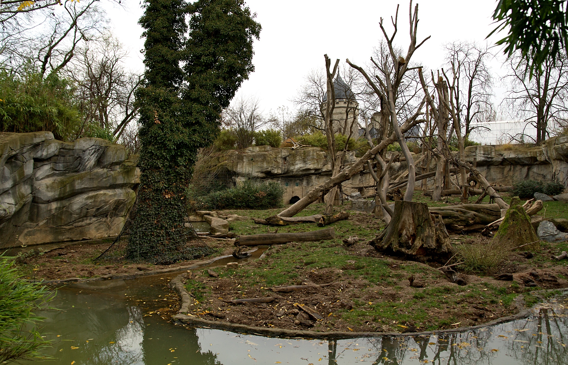 Rechter Teil der Lippenbärenschlucht im Leipziger Zoo